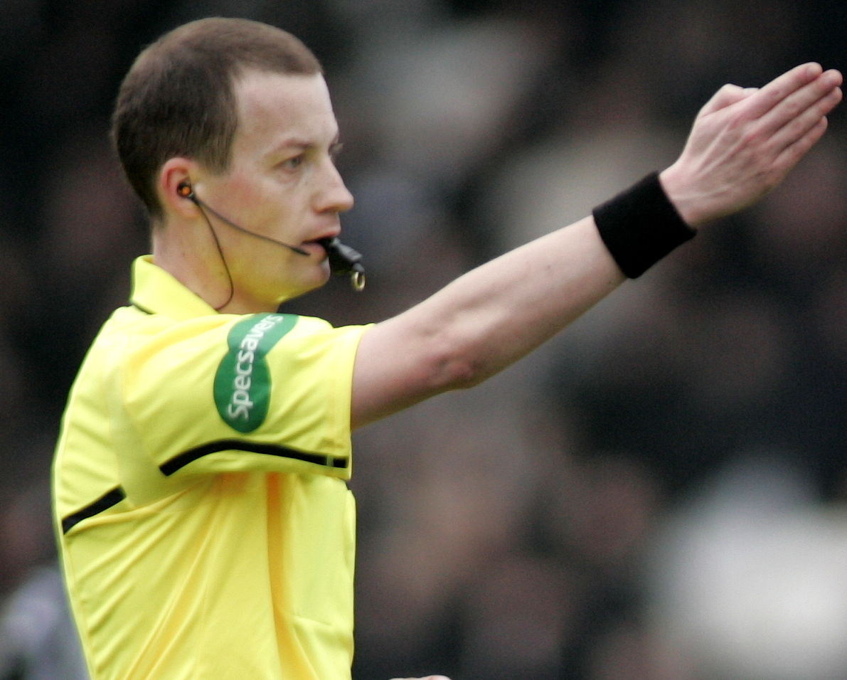 "Big" Willie Collum